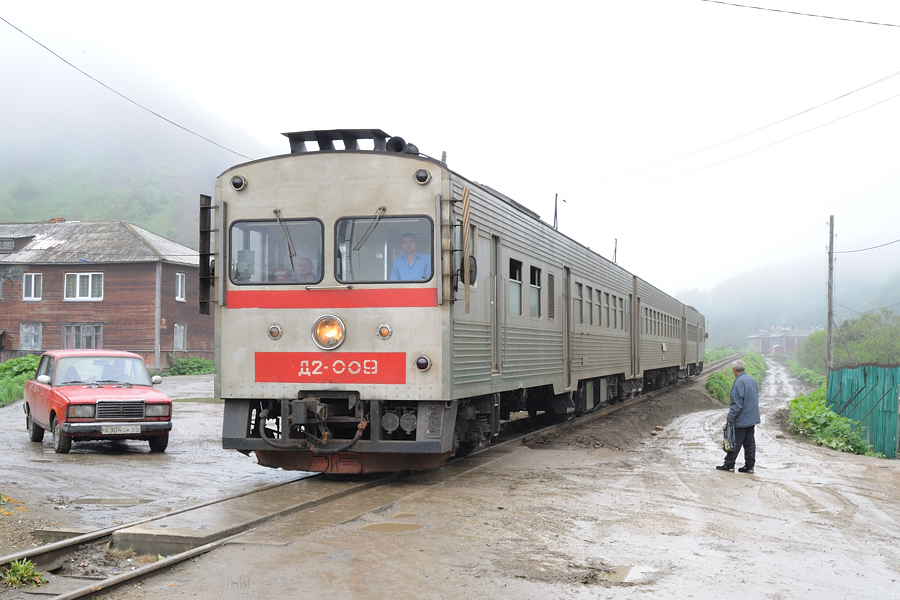 Triebzug der Baureihe Д2 in Poljakowo